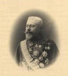 Auguste Goffinet (1857-1927), frère jumeau de Constant Goffinet - Proche du roi Léopold II, chargé de gérer sa fortune privée.